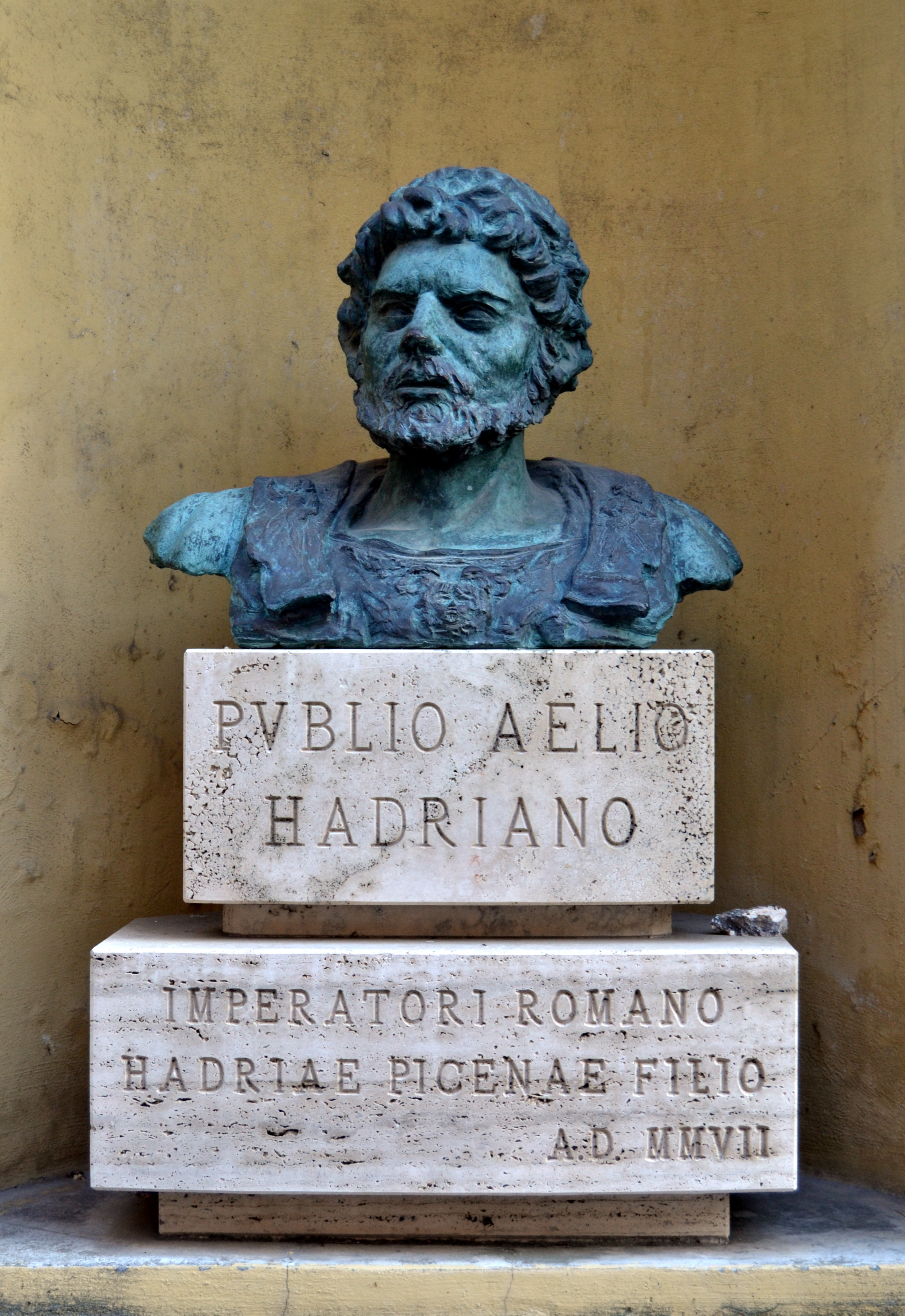 Statua di Adriano nel centro di Atri